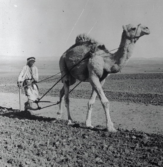 בדואי חורש בנגב